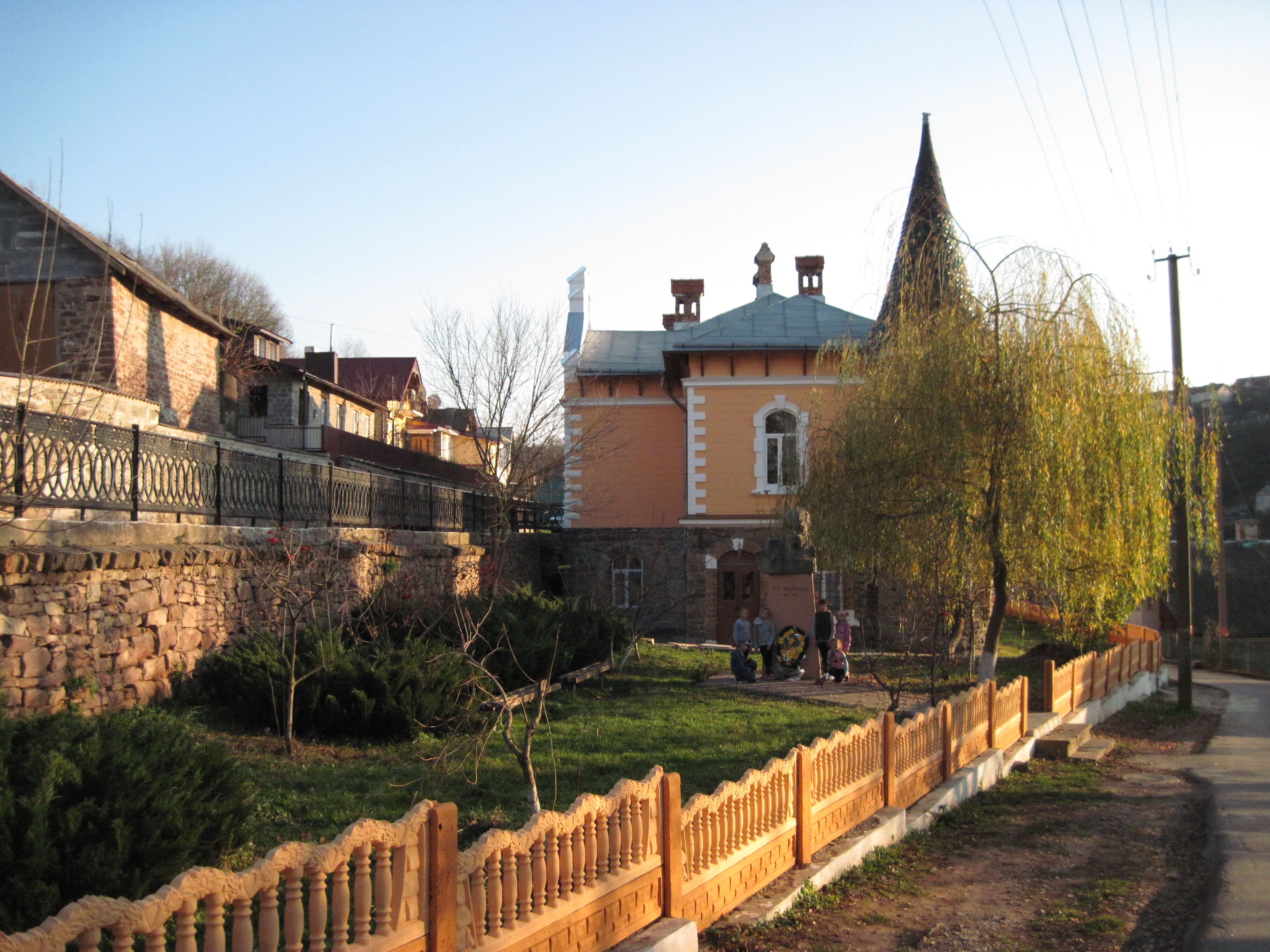 Музична школа. Бучач. Осінь 2013